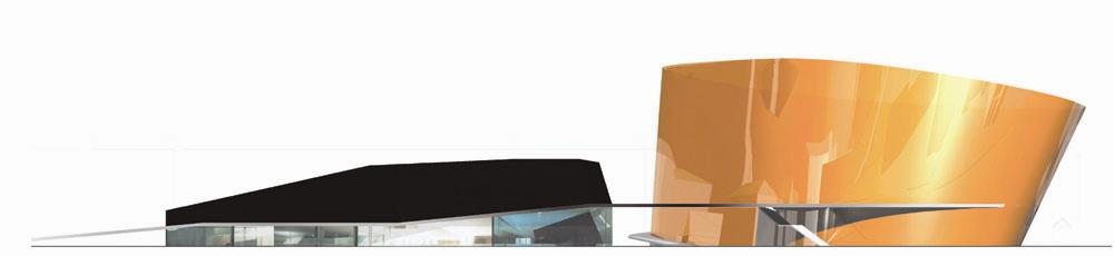 giant amber